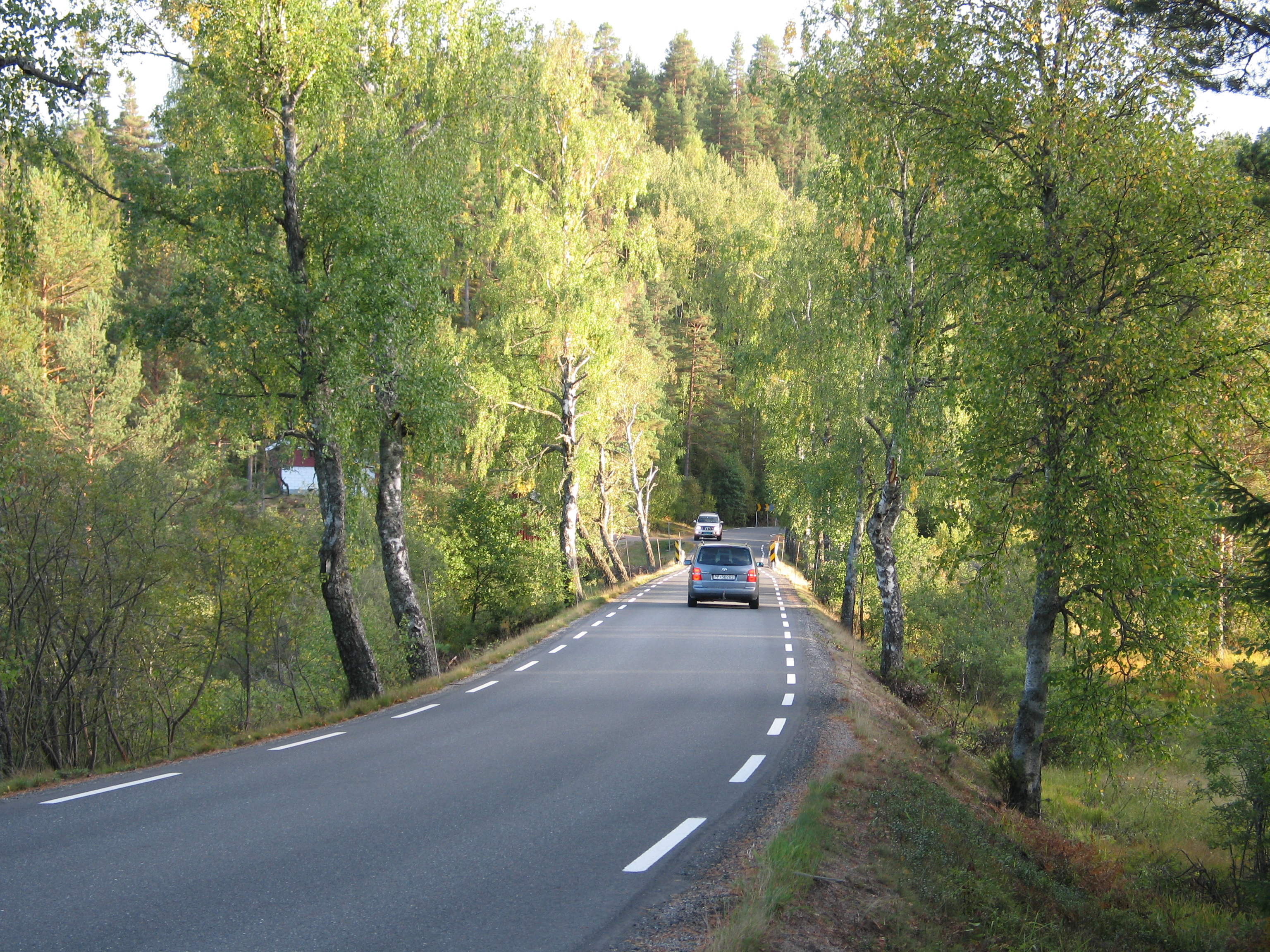 Telemarksveien gjennom Birkenes i Aust-Agder